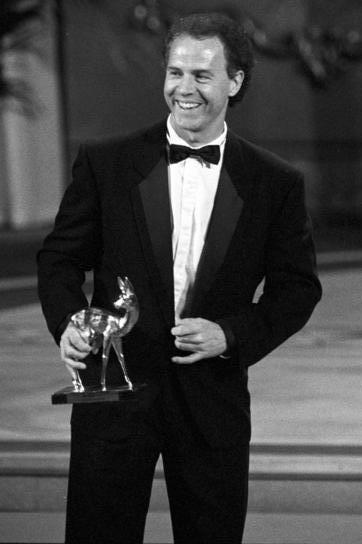 Leipzig, Bambi-Verleihung, Franz Beckenbauer BER-23/27.11.90/Leipzig: Bambi-Preisverleihung / Vor zahlreich vertretener Prominenz aus Politik, Kultur und Medien sowie aus Wirtschaft, Sport, Showbusiness und Gesellschaft fand im Opernhaus am Augustus-Platz die Surda-Medienpreisverleihung statt. Fußballstar Franz Beckenbauer wurde mit dem Sport-Bambi-Preis für seine Intuition und Perfektion geehrt, mit der er als Teamchef die deutsche Nationalmannschaft 1990 zum WM-Titel geführt hatte. Abgebildete Personen: Beckenbauer, Franz: Fußballnationalspieler, Bundesrepublik Deutschland (GND 118508067)